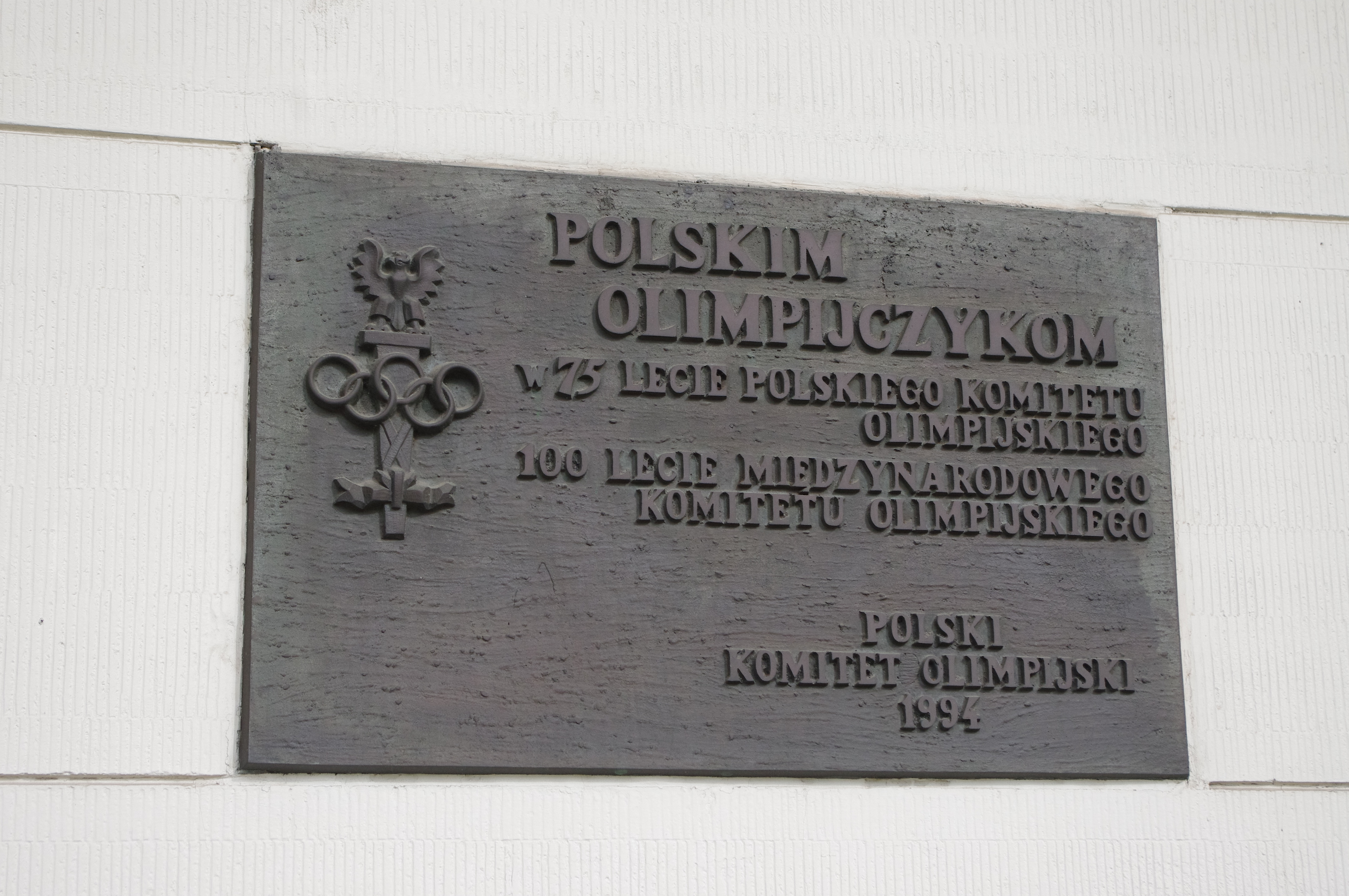 Tablica upamiętniająca PKOl w 75-lecie istnienia i MKOl w 100-lecie istnienia na ścianie Bazyliki Najświętszego Serca Jezusowego w Warszawie